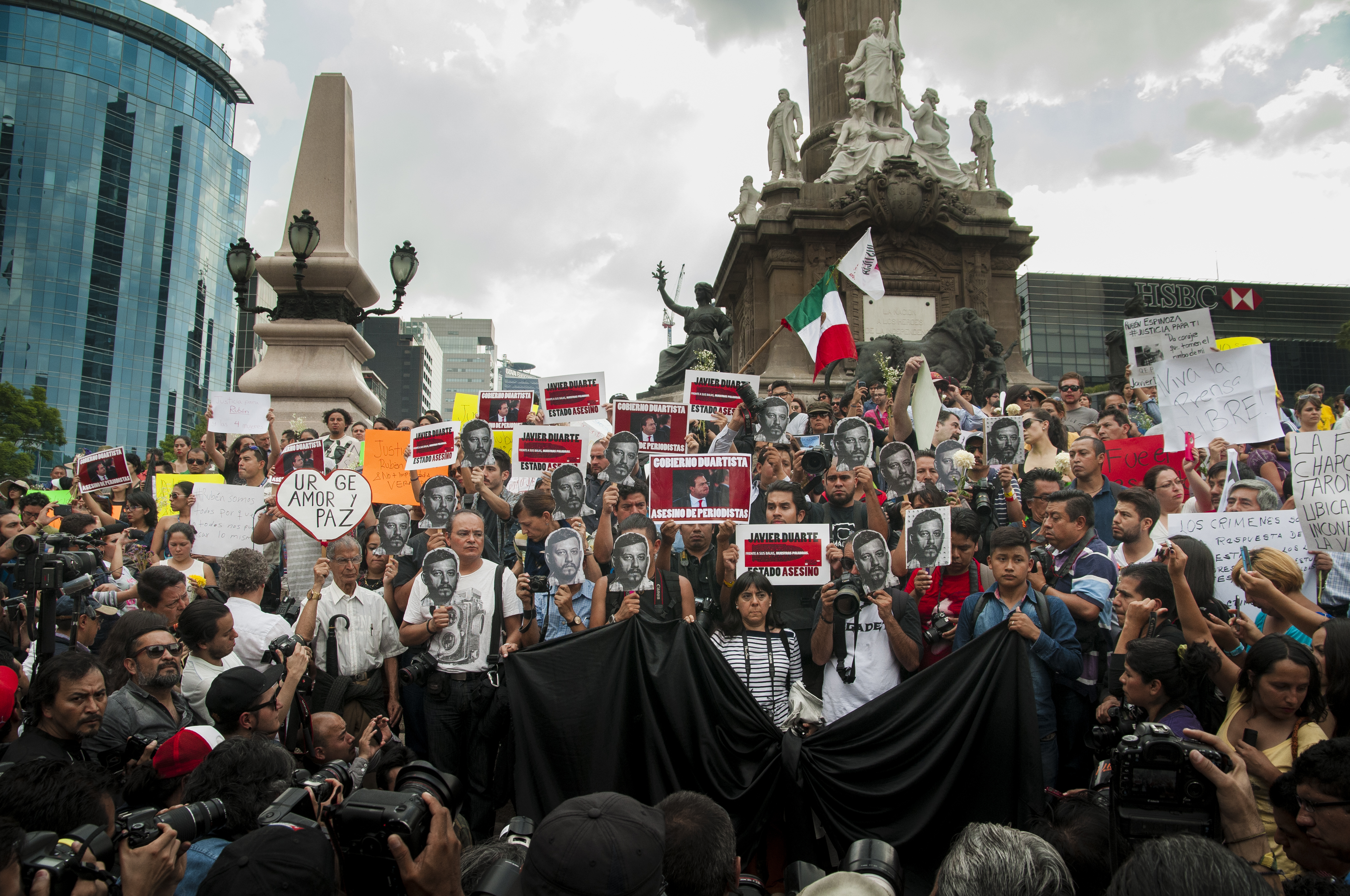 El fotoperiodista Rubén Espinosa fue asesinado en el Distrito Federal junto con otras 4 mujeres. Se encontraba refugiado en la capital mexicana debido al constante acoso del gobierno veracruzano de Javier Duarte. Los periodistas se reunieron en el Ángel de la Independencia para marchar hacia la representación del gobierno veracruzano en el DF y exigir justicia para Rubén y las mujeres que fueron asesinadas con él. JusticiaParaRubén